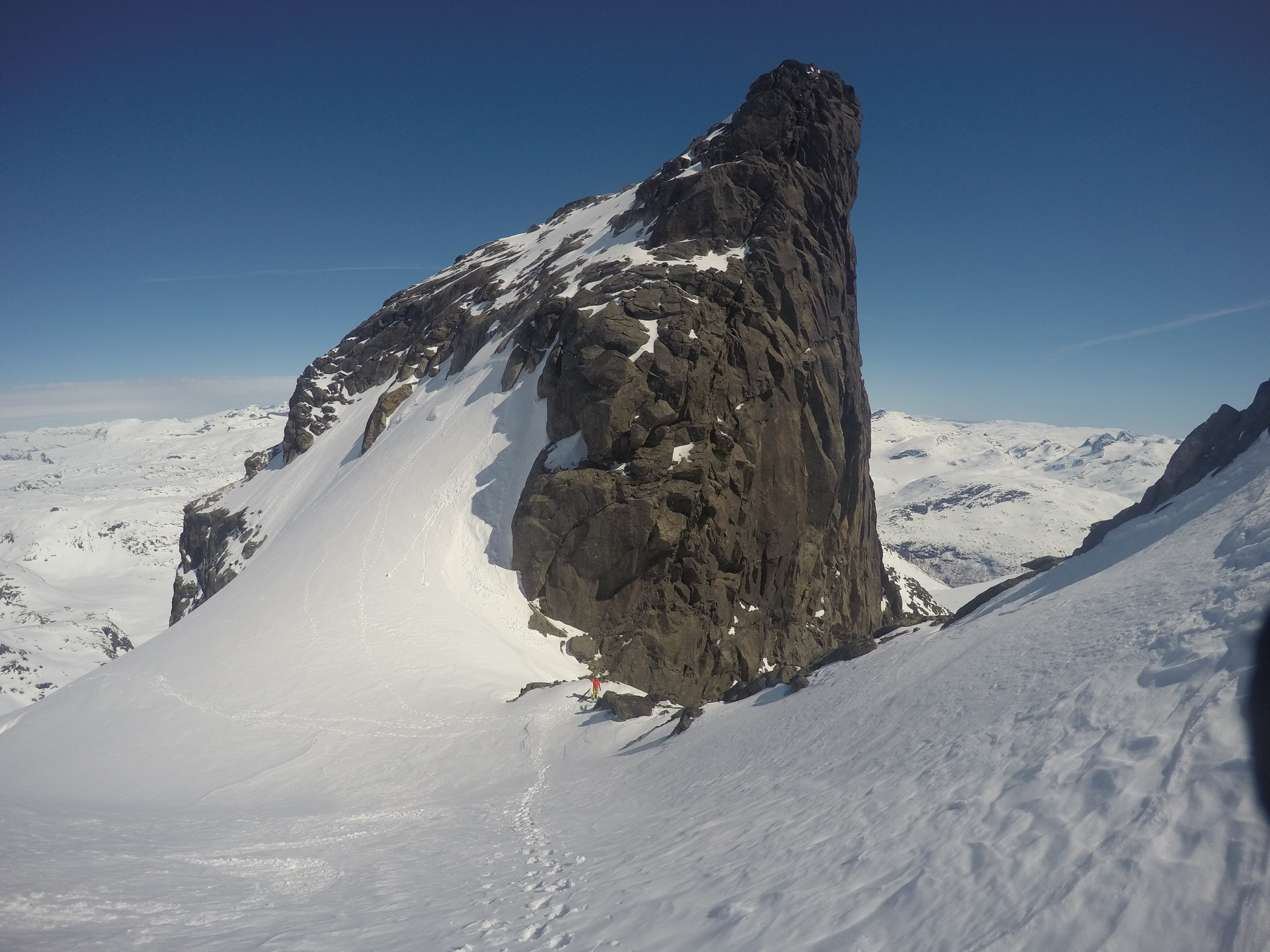 Gjertvasstind sett fra Gjertvasskaret.